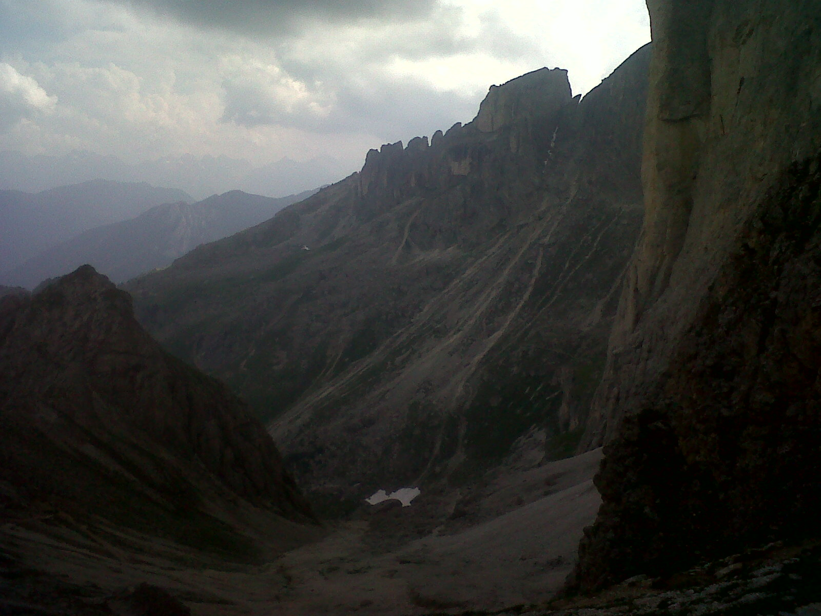 Vista sul Vael dal versante occidentale del passo delle Cigolade (2540 m).